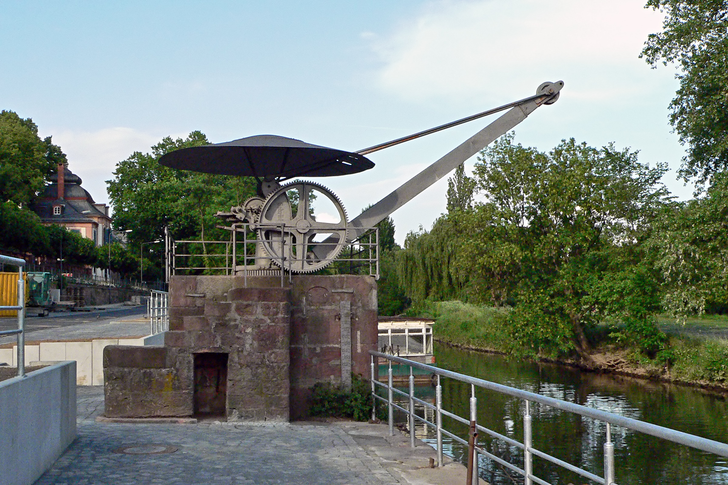 Handkran an der Niddamündung, Seilerbahn in Frankfurt-Höchst, datiert lt. Tafel auf 1770